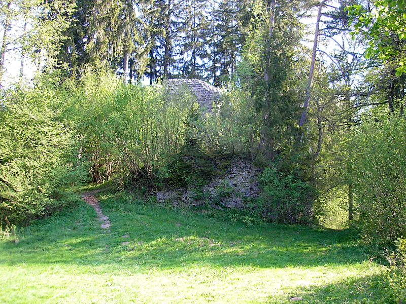 Burg Neuenburg bei Durach (Landkreis Oberallgäu, Bayerisch-Schwaben). Die Hauptburg vom Vorburgplateau. Eigene Aufnahme, Mai 2008 / Neuenburg castle near Durach (Landkreis Oberallgäu, Bavaria, Germany). The central castle from the bailey. Own photo, May 2008